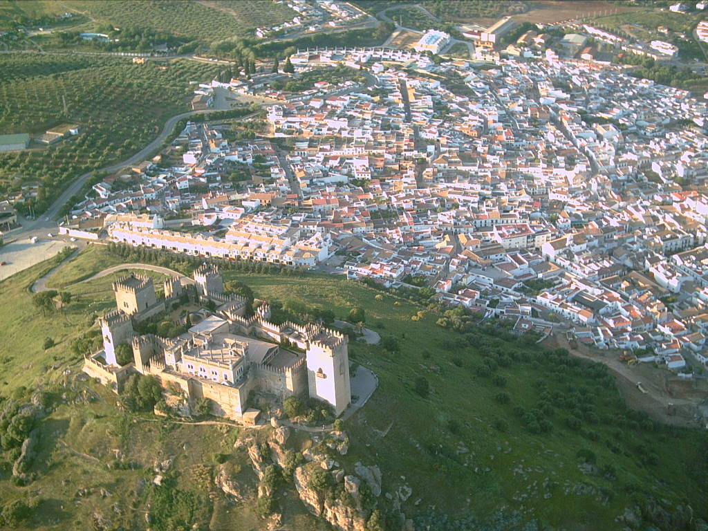 Foto aérea de la localidad de Almodóvar del Río (Córdoba, España)